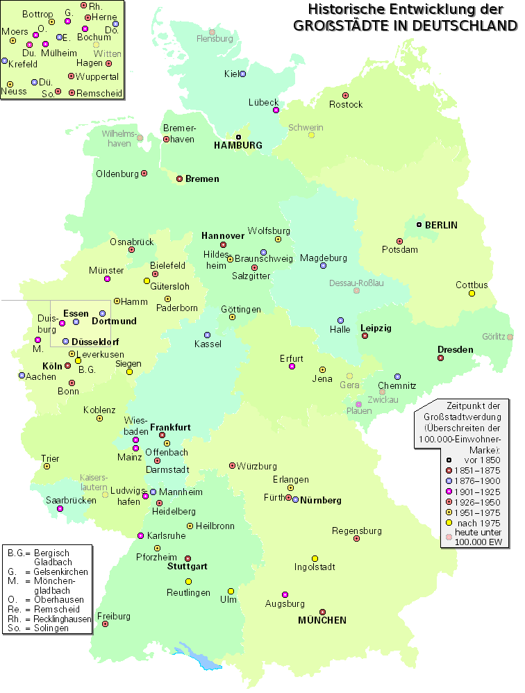 Entwicklung der Großstädte in Deutschland (Stand: April 2017)